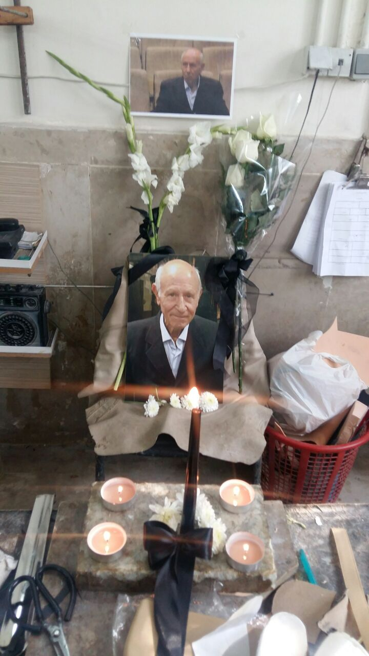 صندلی علی اکبر کاملی در محل کارگاه کفاشی در دانشکده توانبخشی